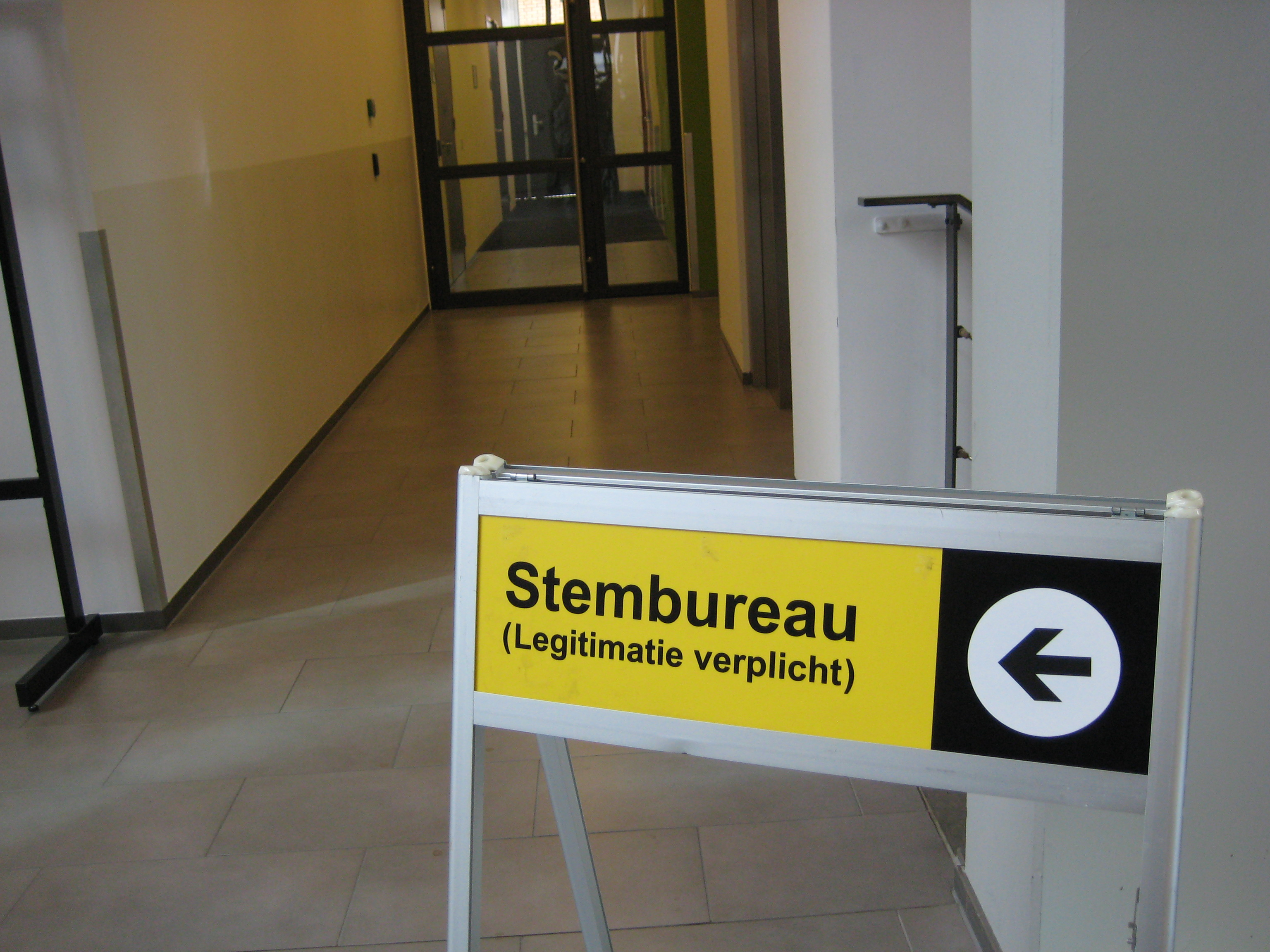 Stembureau gemeentehuis Winterswijk